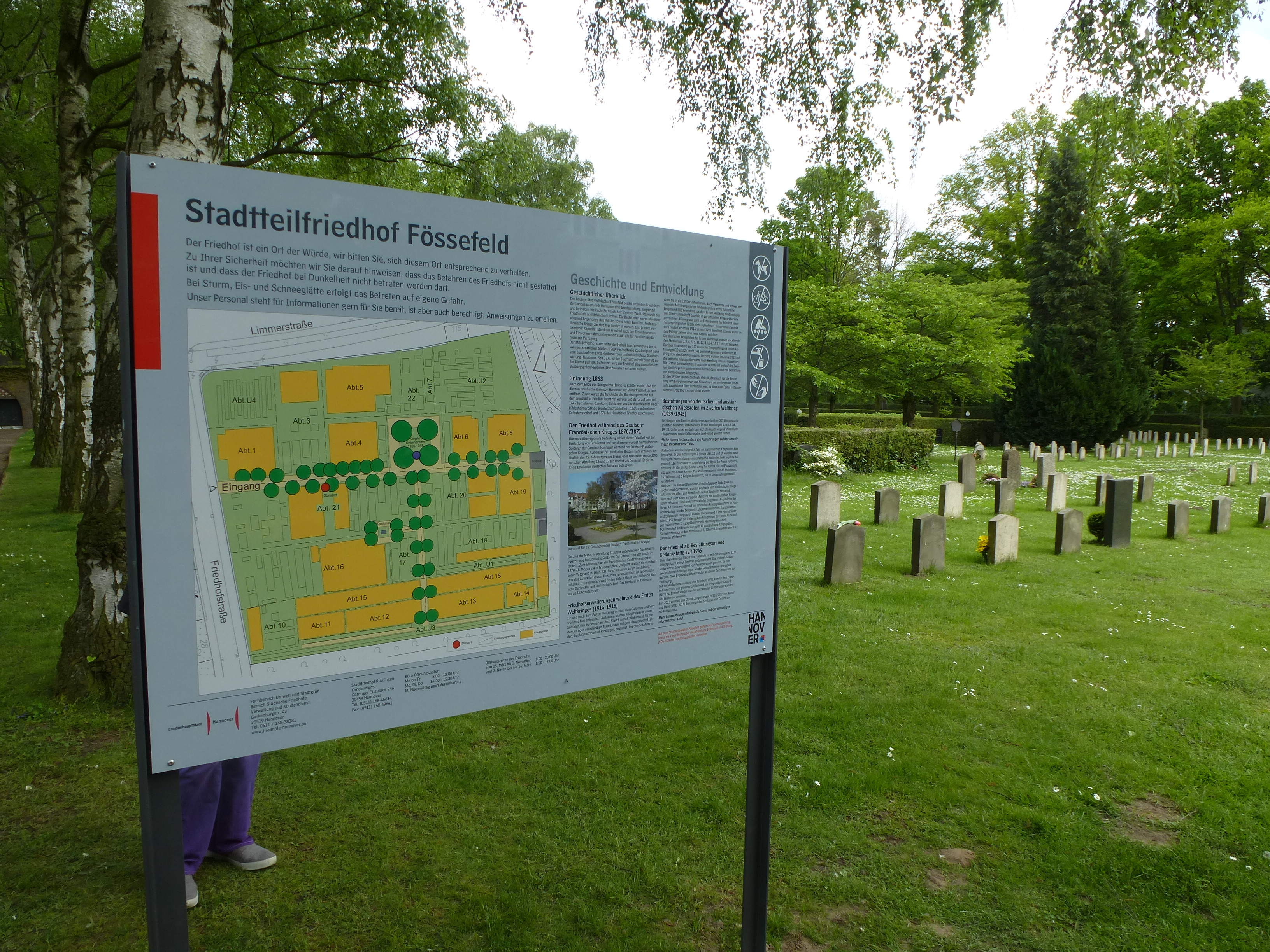 Einweihung der neuen Informationstafel für die Opfer der NS-Wehrmachtsjustiz, die auf dem Stadtfriedhof Fössefeld beigestzt wurden, und des Denkmals "Ungehorsam 1939 - 1945" von Almut und Hans-Jürgen Breuste am 9. Mai 2015.